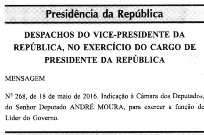 Despachos do Vice-Presidente da República, no exercício de Presidente da República como mensagem número 268 à Câmara dos Deputados, indicando liderança do governo na referida casa.